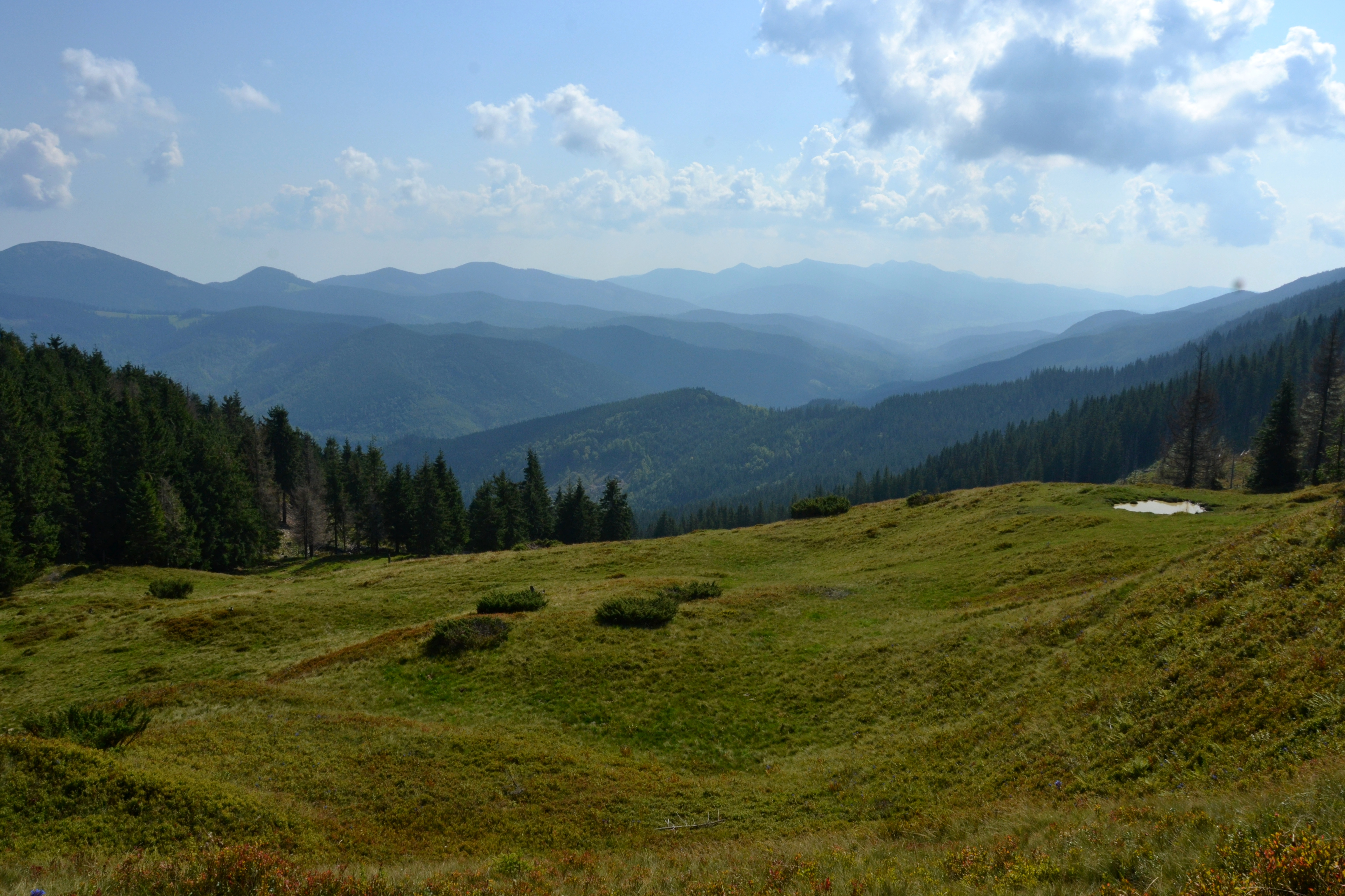 Хребет Тавпишірка